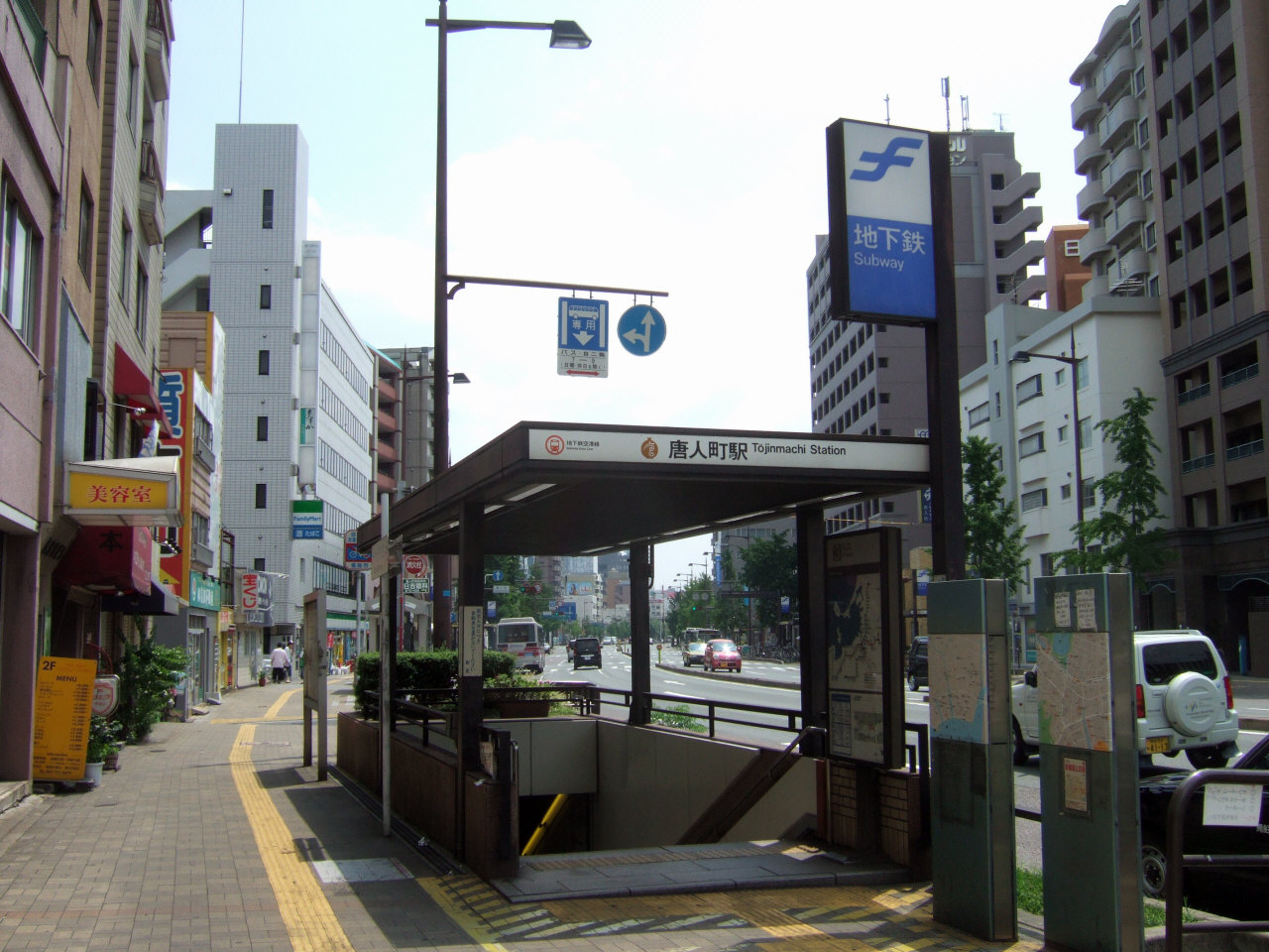 福岡市地下鉄唐人町駅